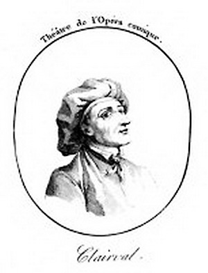 vignette représentant Clairval et son fameux chapeau